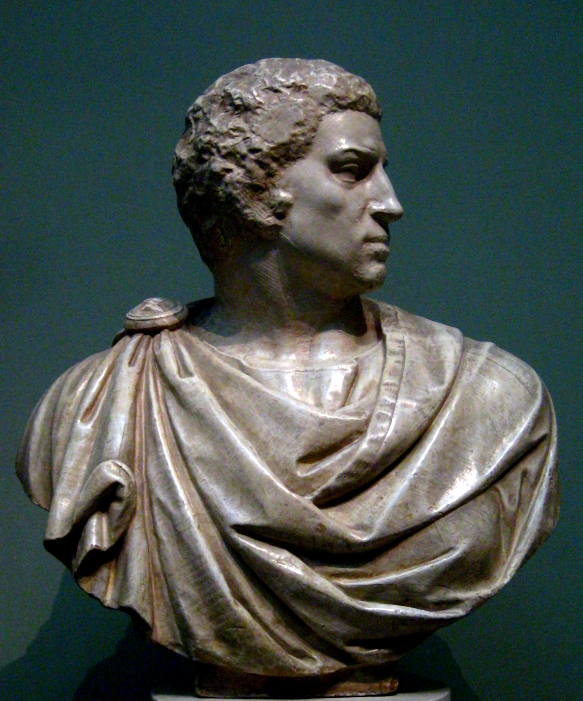 Michelangelo's Brutus